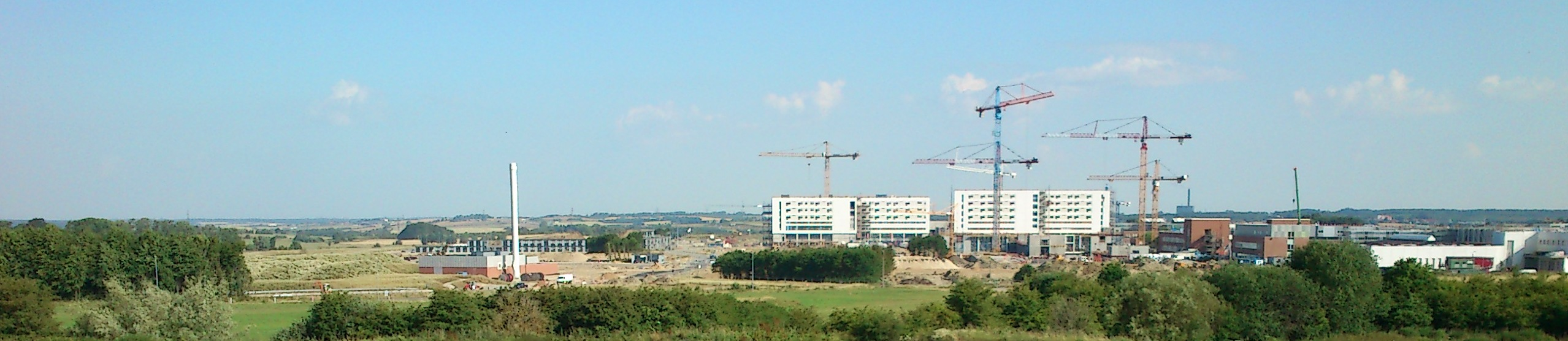 Det Nye Universitetshospital (DNU), juli 2014.